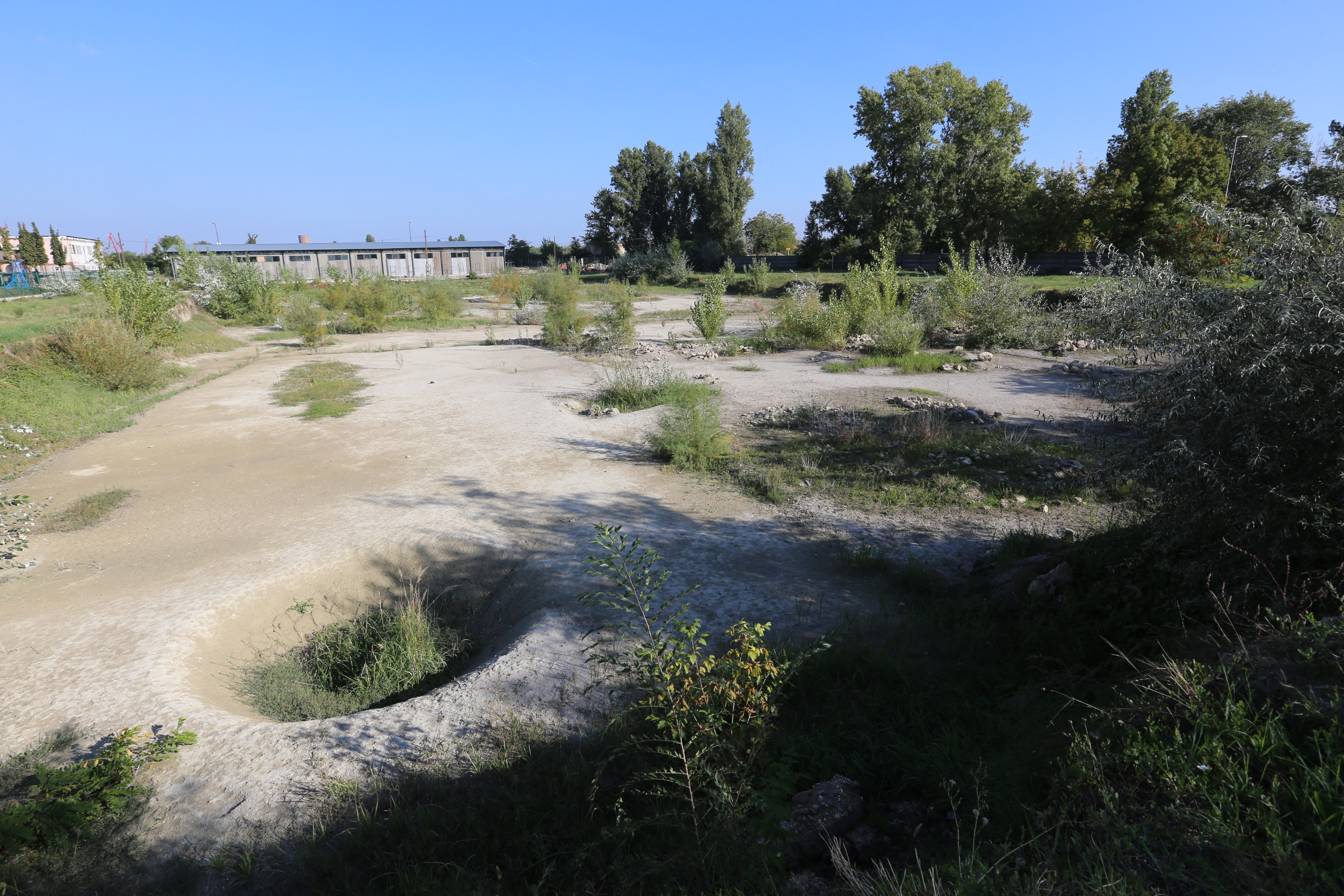 albertfalvai római tábor romjai This is a photo of a monument in Hungary. Identifier: 1103